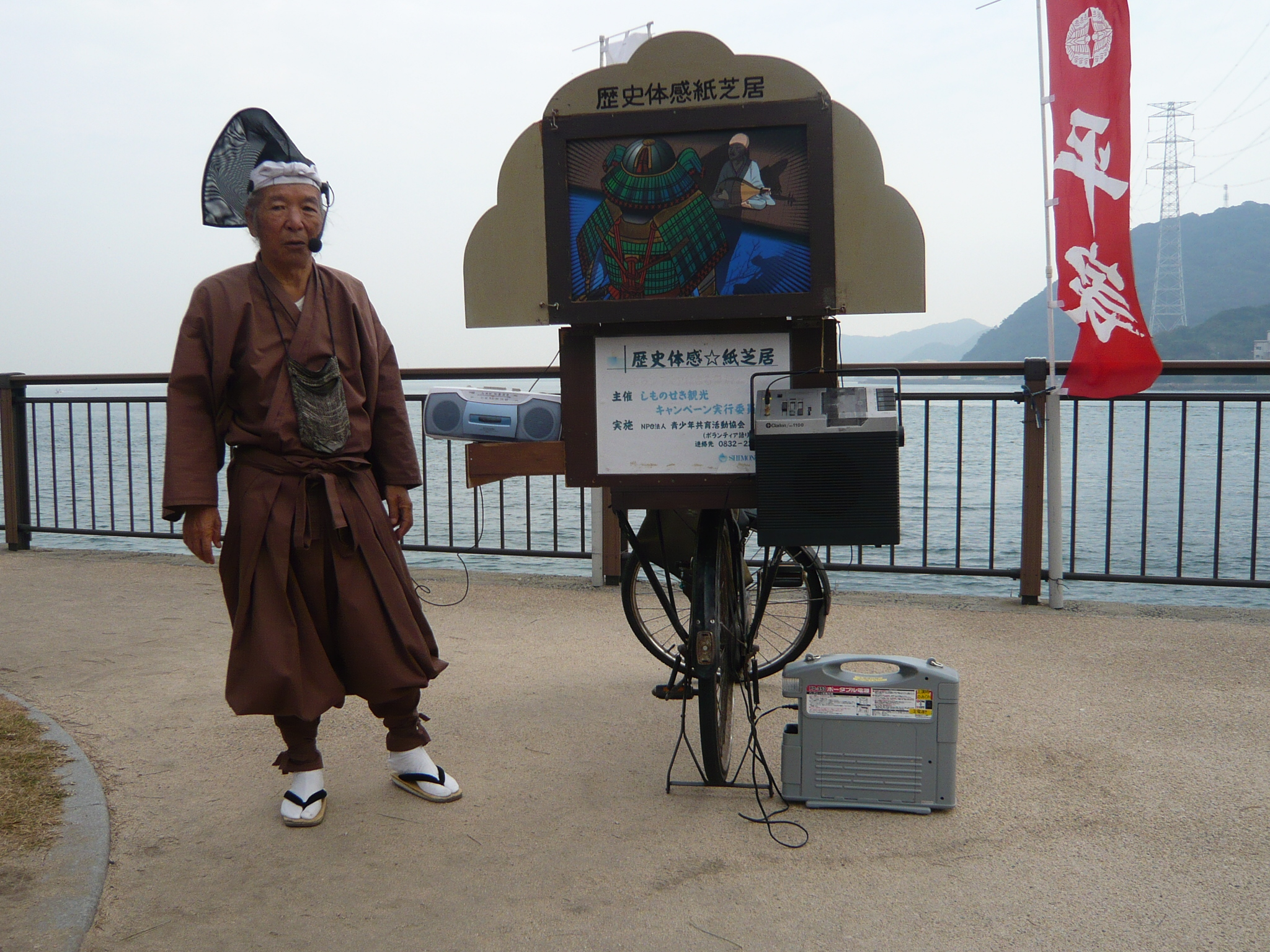 Shimonoseki (okcidente de Honshu) maljuna viro rakontis la venkon de junulo dum la fama batalo de Dan no Ura. vidu la laùtparolilon apud lia biciklo.